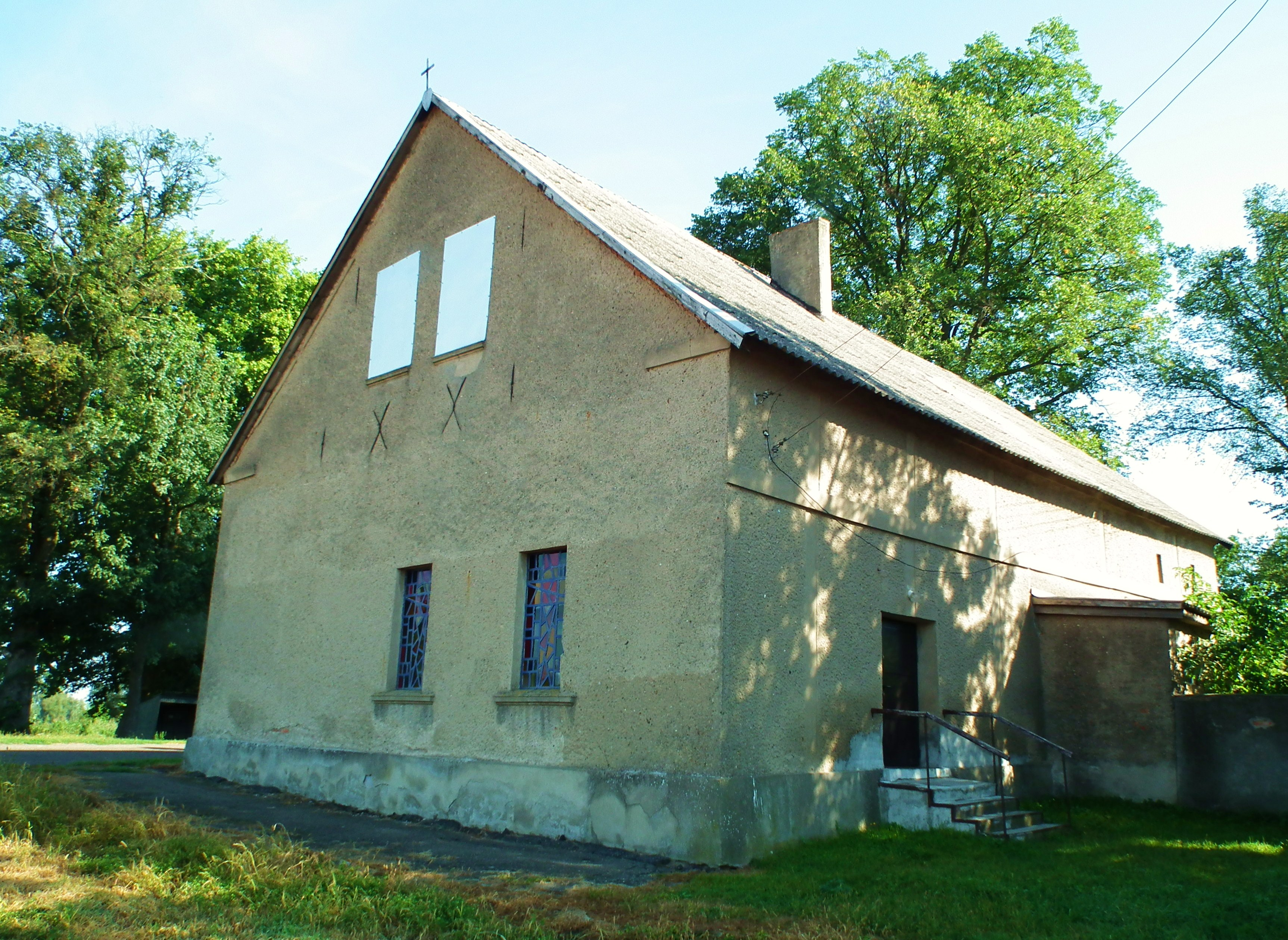 Kaplica Matki Bożej Nieustającej Pomocy w Zaszczytowie (d. Anapolis).